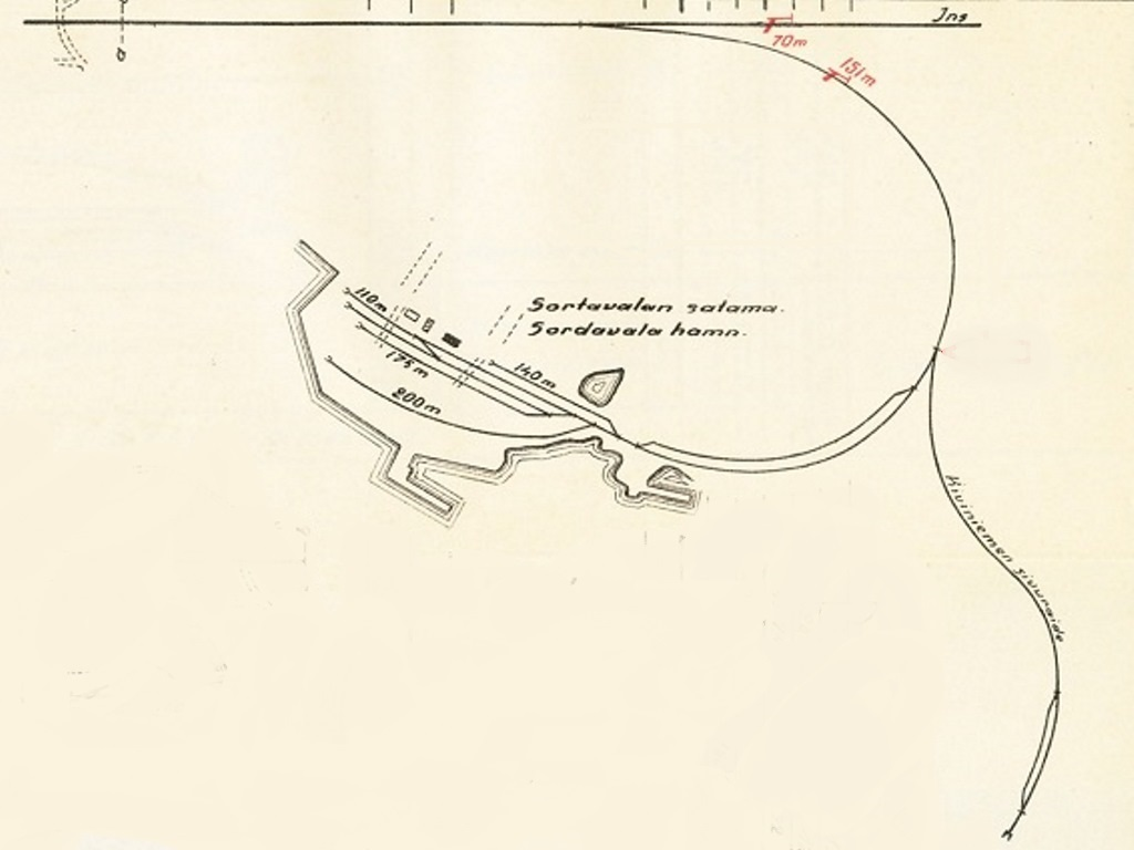 Сортавала-Пристань схема 1